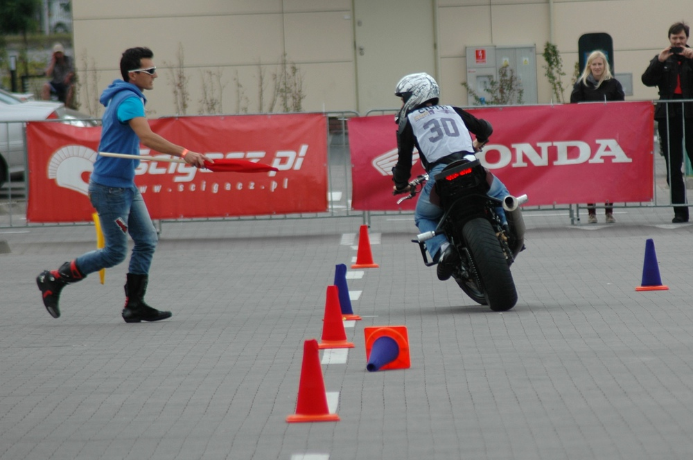 Sędzia liniowy pokazuje zawodnikowi, w którym miejscu pomylił trasę. Piotr "Barry" Baryła i Łukasz "Ciut11" Musieliński na finale Honda Gymkhana 2012.